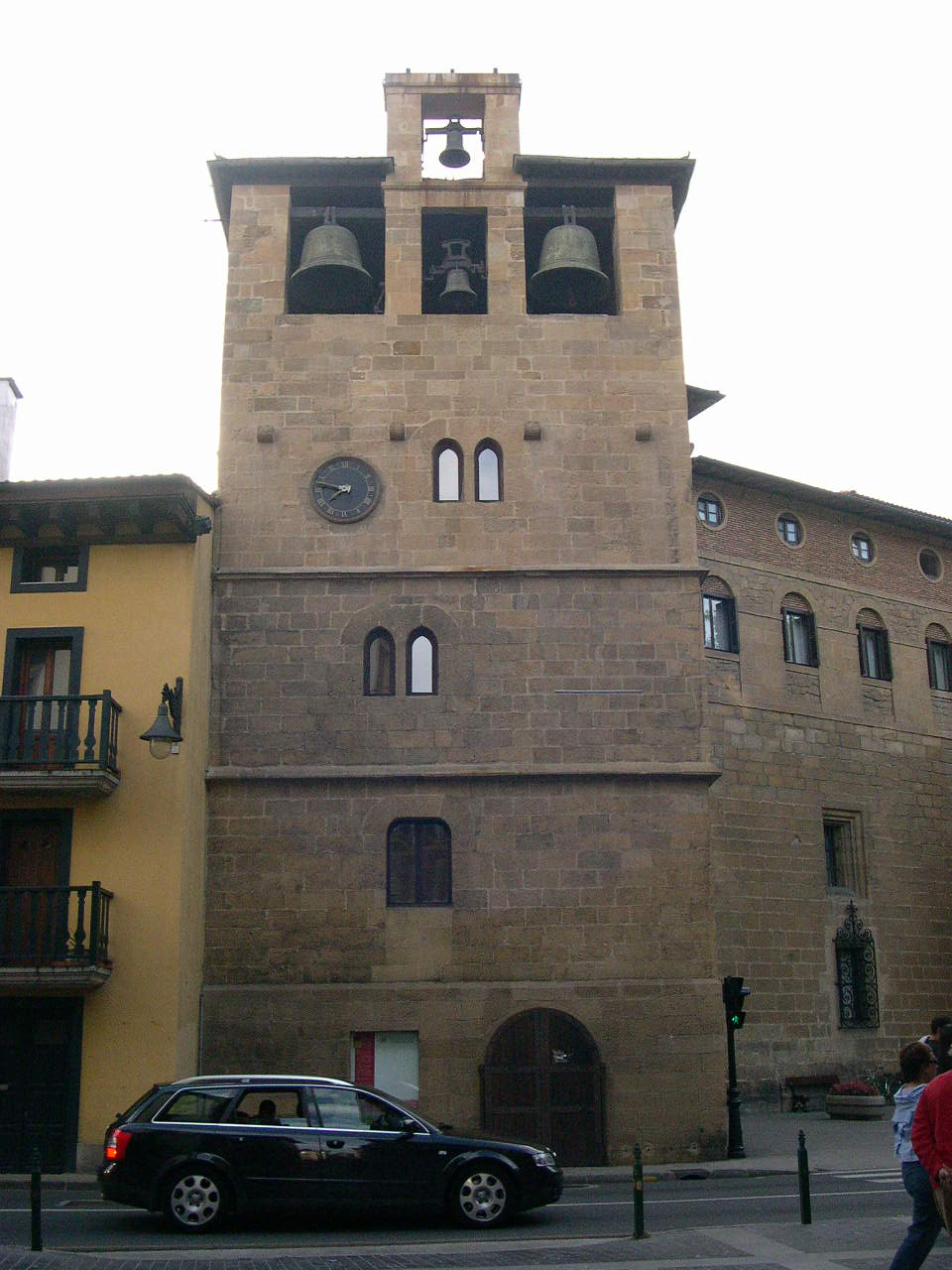 Església de Santa Maria la Real, a la part vella de Zarautz.